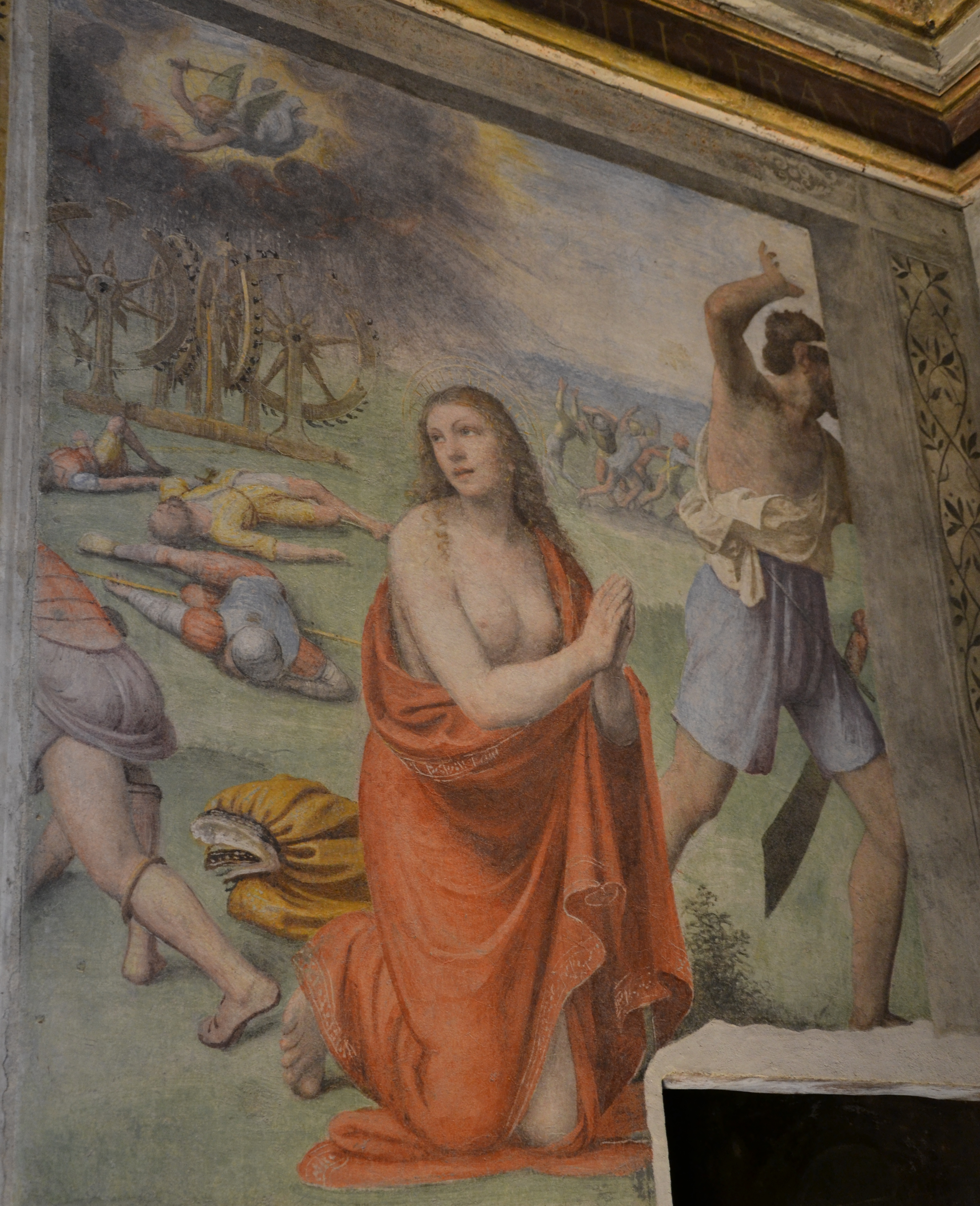 Milano - San Maurizio al monastero maggiore, cappella Besozzi di santa Caterina Affreschi di Bernardino Luini, 1530